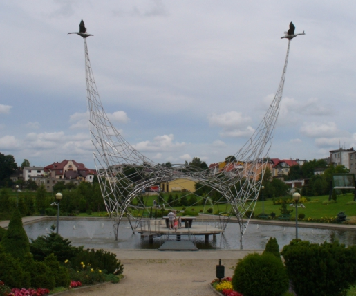 Sierakowice (województwo pomorskie)